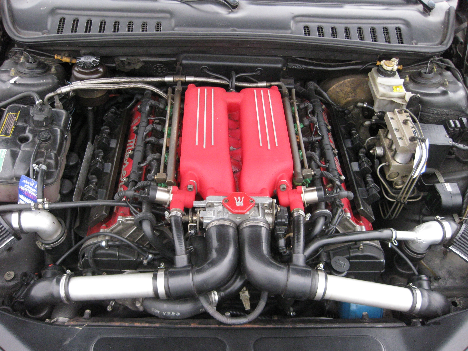 Maserati Quattroporte IV 8-Zylinder-Motor